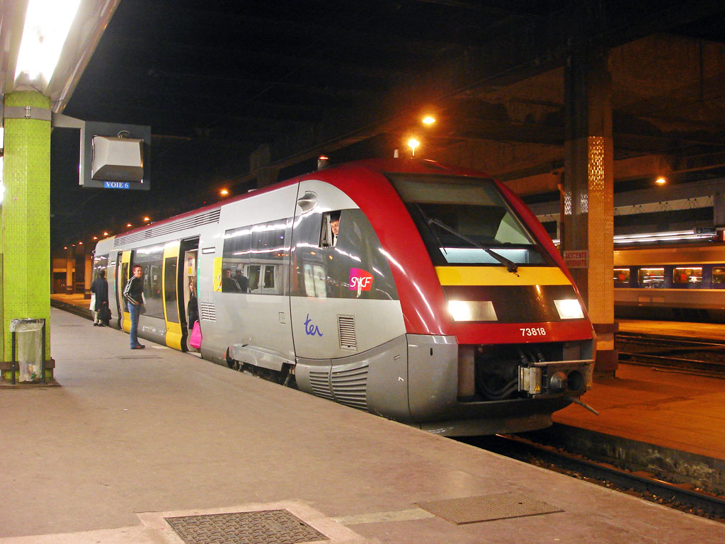 X 73818 encore aux couleurs luxembourgeoises prêt au départ sur un TER pour Verdun